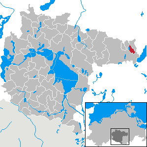 Krukow im Landkreis Müritz, Mecklenburg-Vorpommern